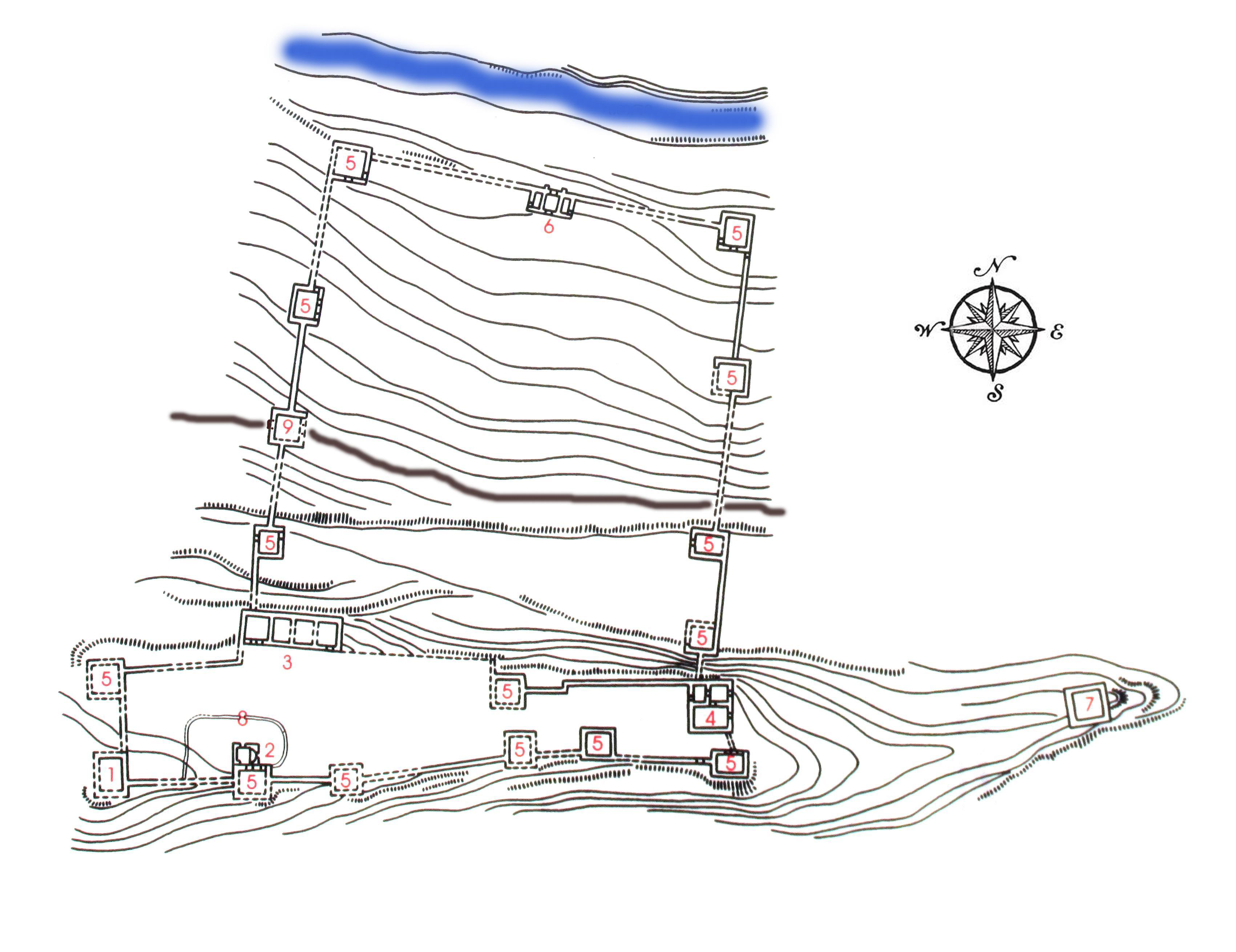 უჯარმის ციხის გეგმა